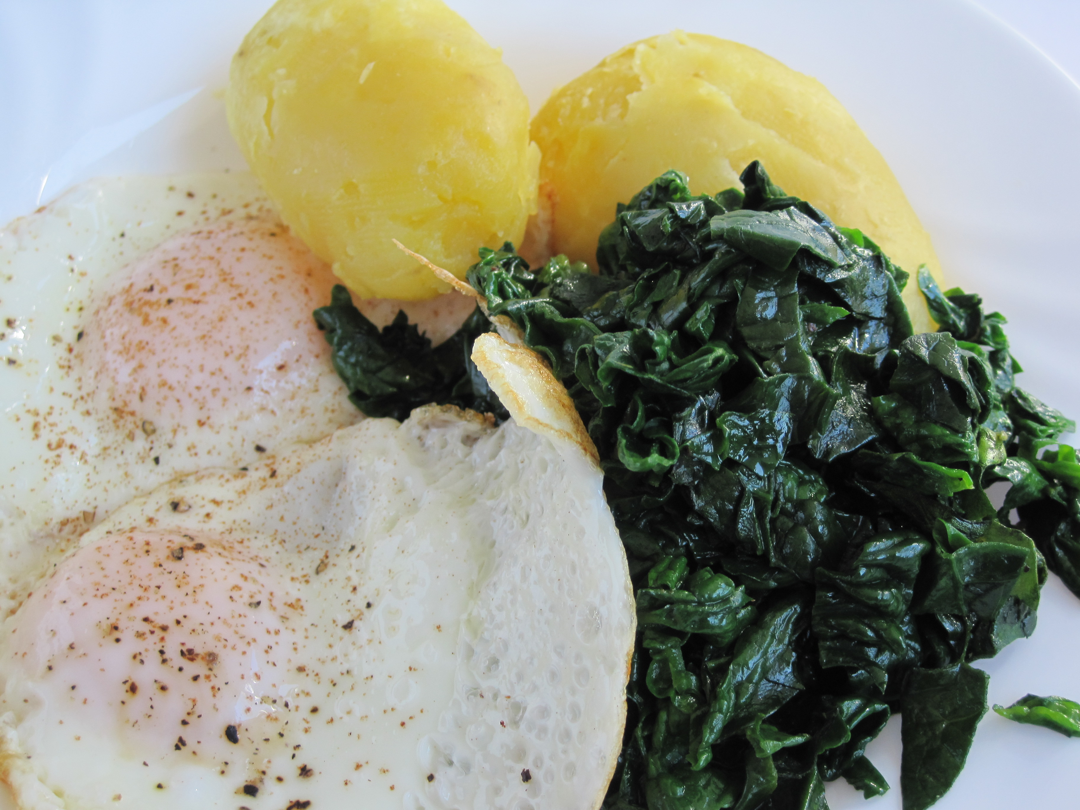 Spiegeleier mit Spinat und Kartoffeln.